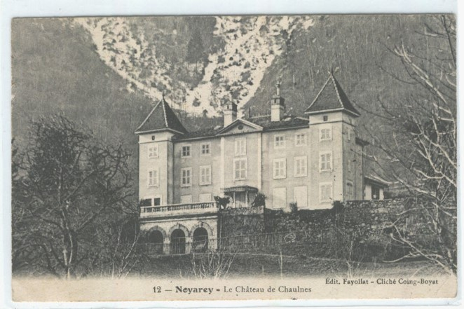 Carte postale Chaulnes 1907